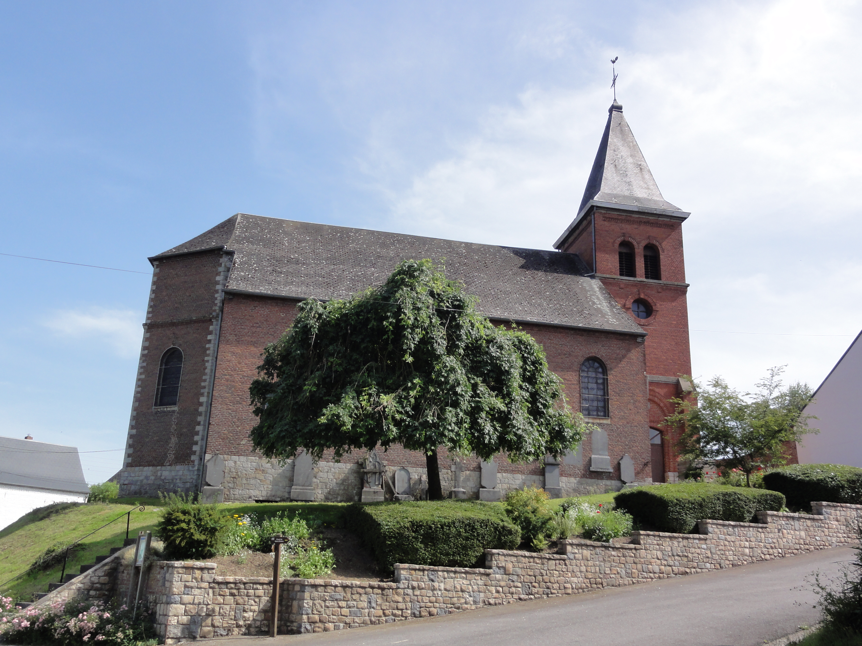 Frasnoy (Nord, Fr) église Saint-Clément, vue latérale